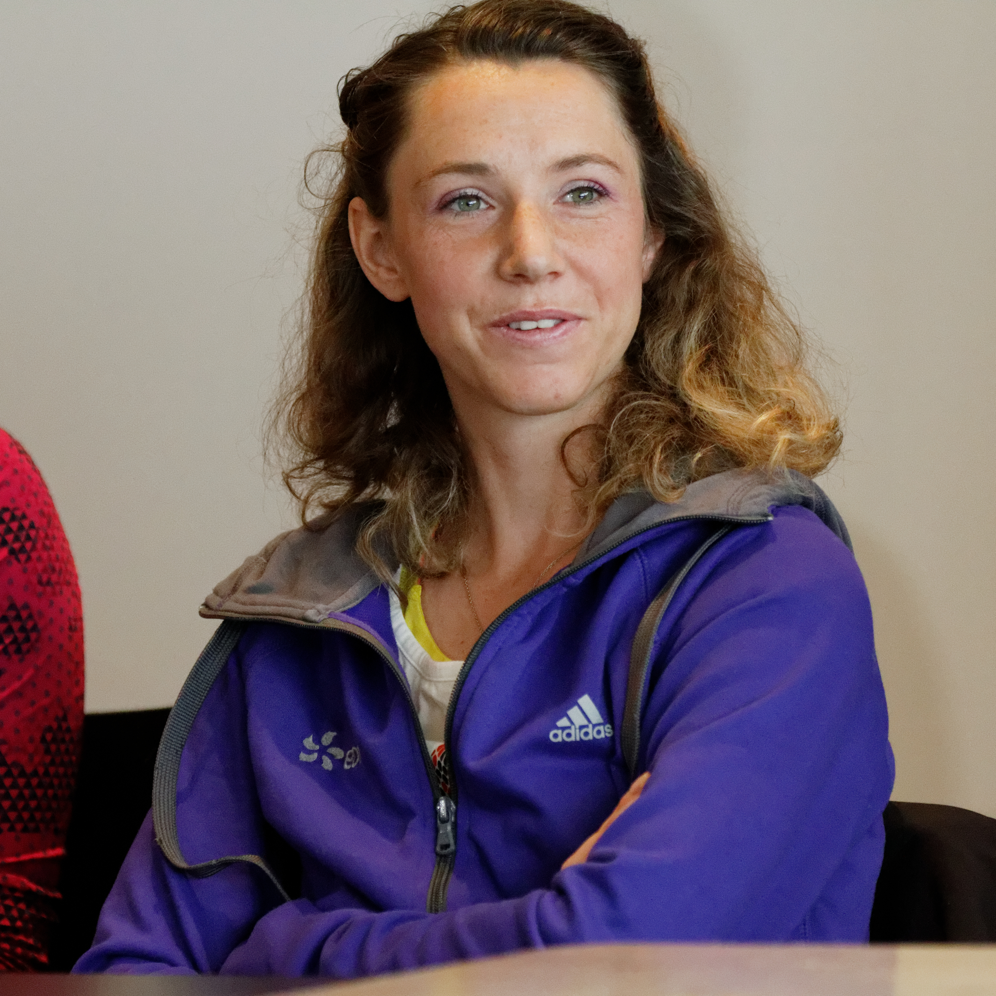 Marie-Amélie Le Fur lors de la conférence de presse du meeting international d'athlétisme Paris Ile-de-France, 4 juin 2014